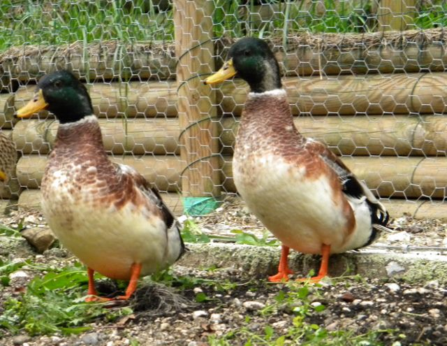 ANATRA SILVER APPLEYARD COPPIA DI MASCHI -TWO MALES